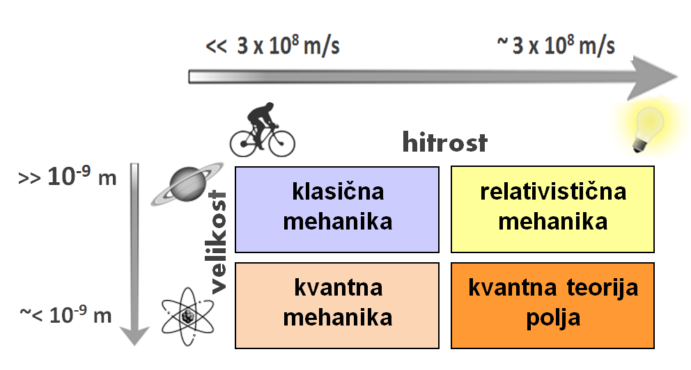 poslovenjena in prirejena slika modernphysicsfields.svg